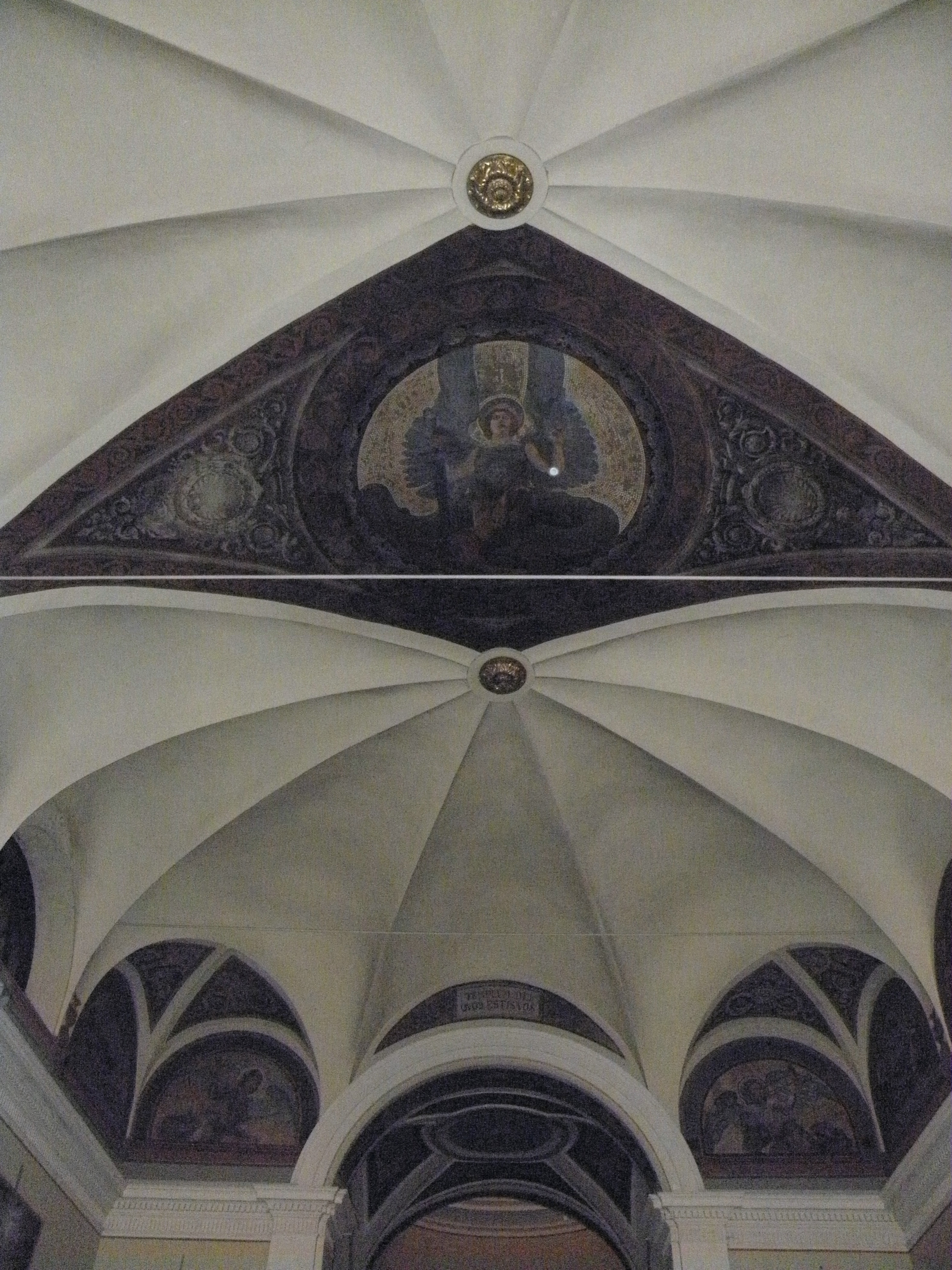 Parma, chiesa di San Michele Arcangelo (o San Michele dall'Arco): interno, parte delle volte gotiche e affrescate del soffitto.